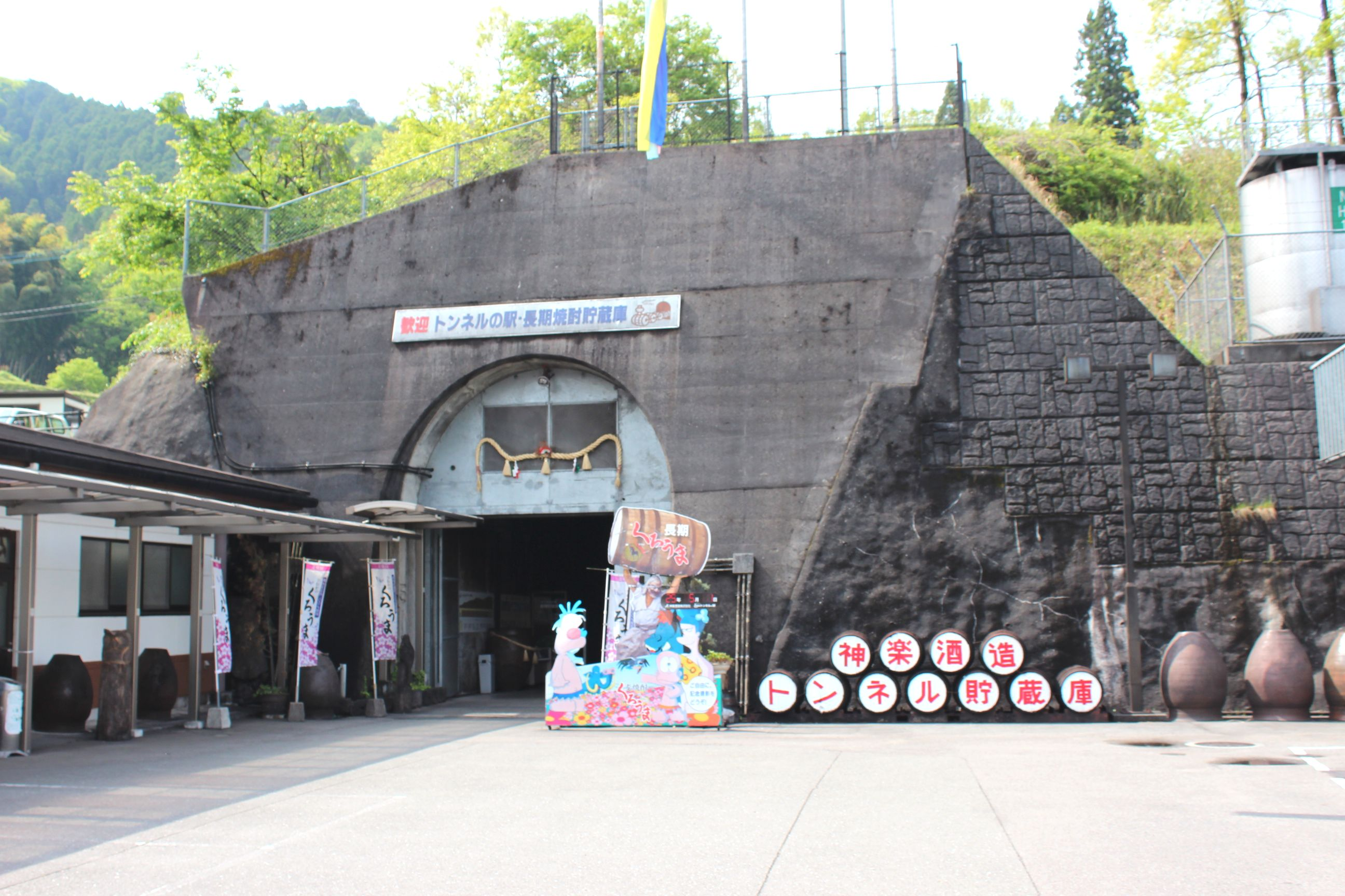 神楽酒造高千穂観光物産館トンネルの駅のトンネル貯蔵庫（葛原トンネル）